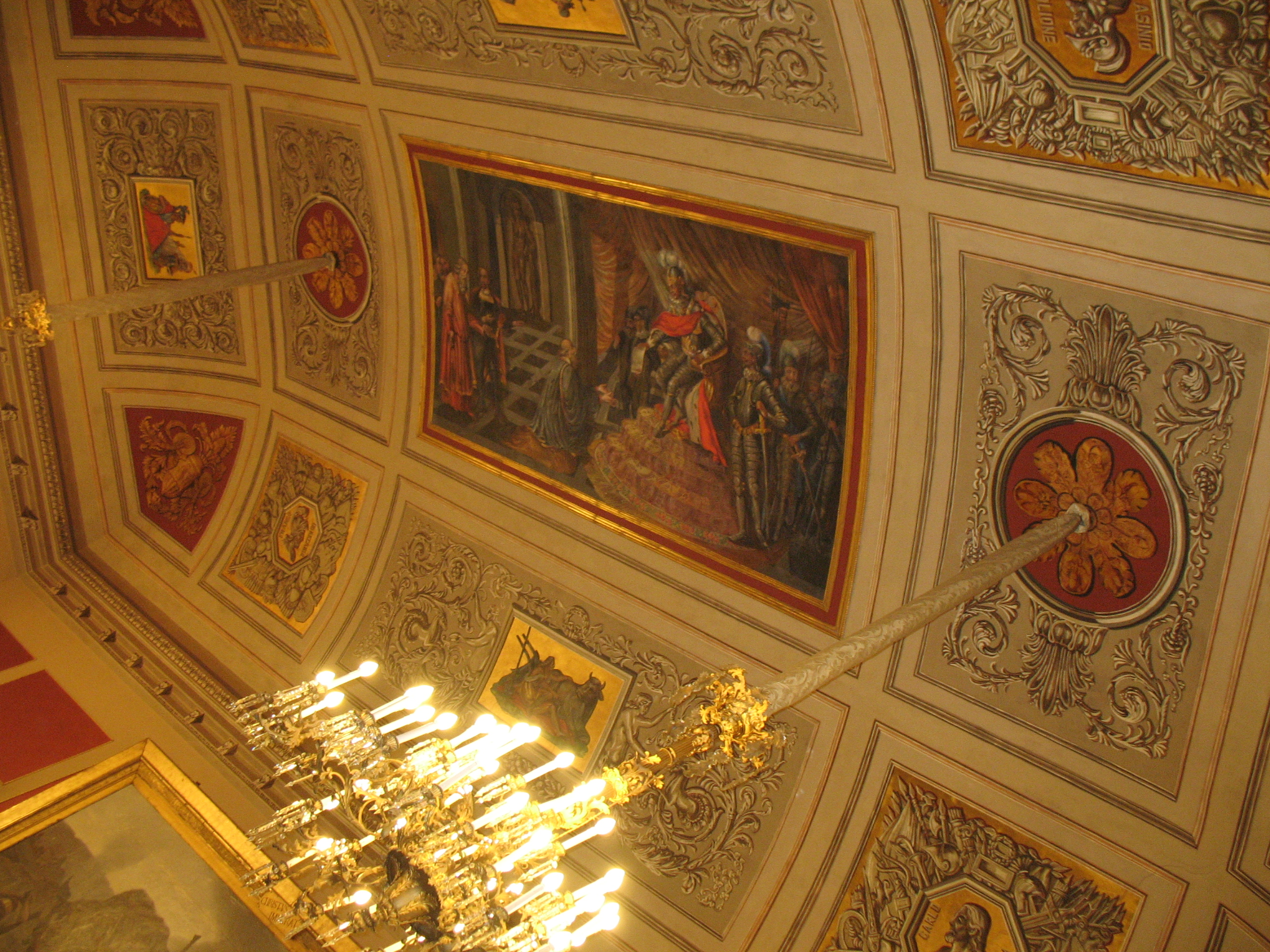 Affreschi e lampadari della sala di rappresentanza del Palazzo dell'amministrazione provinciale di Chieti.